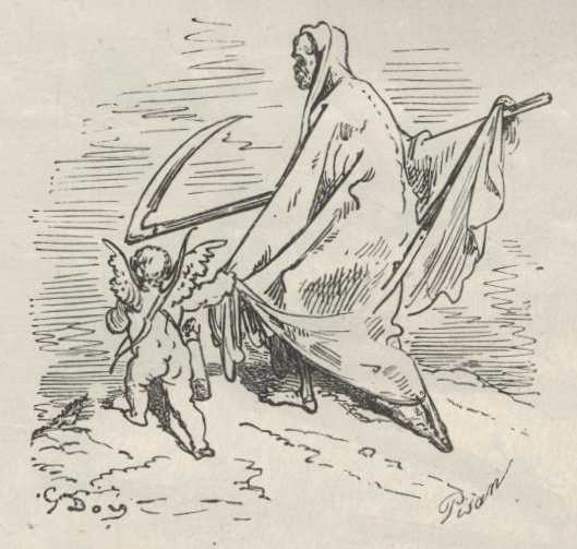 O Amor caminha ao lado da Morte agarrando-se na sua capa.